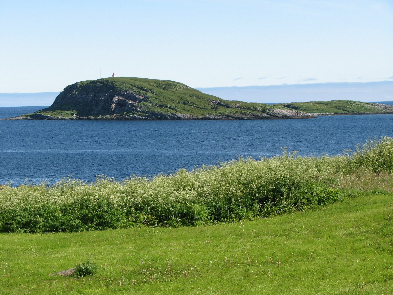 På Hornøya ligger Norges østligste punkt.